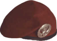 Basco di paracadutista